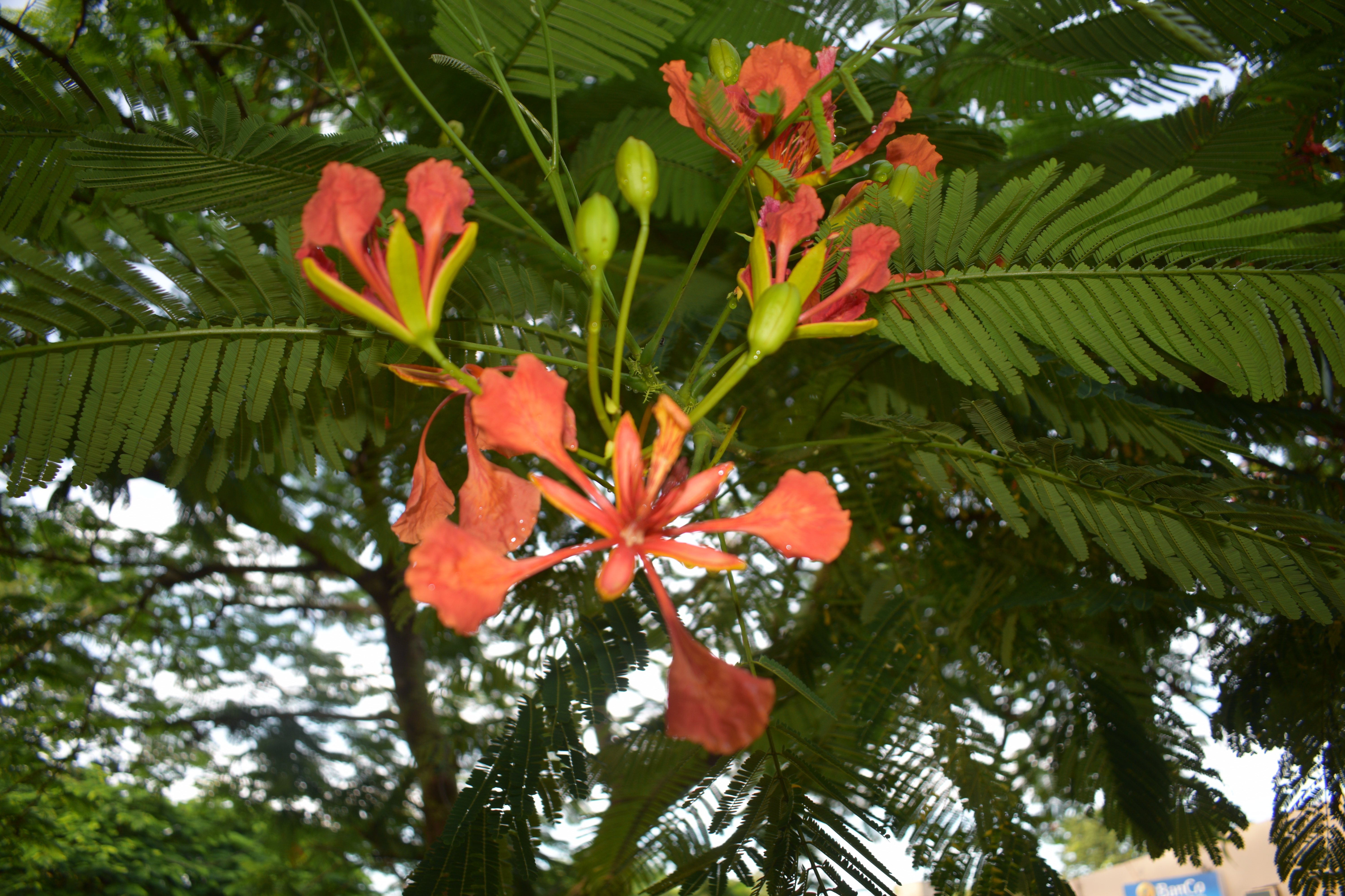 ABUNDANTE VEGETACION